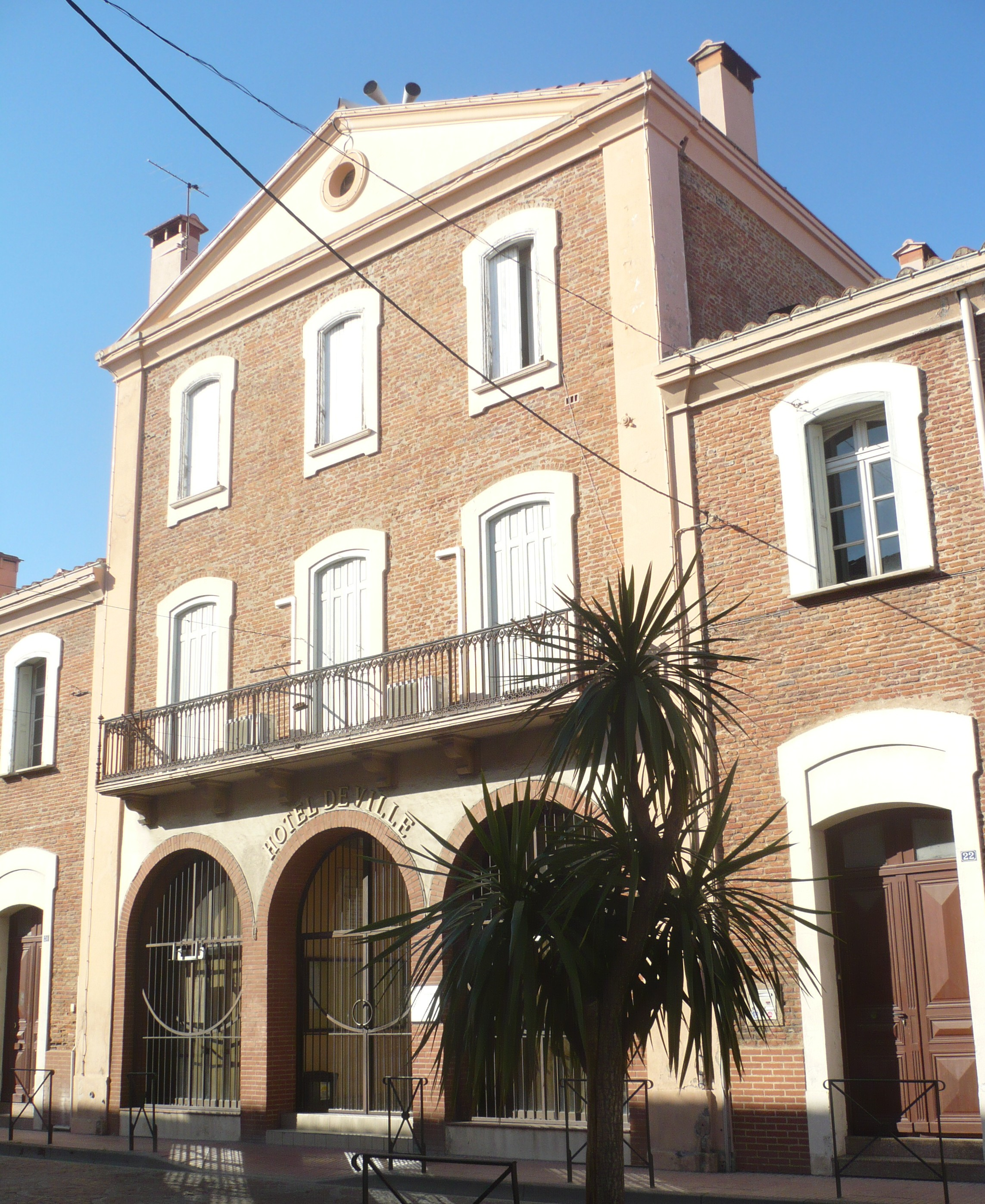 Mairie de Bages